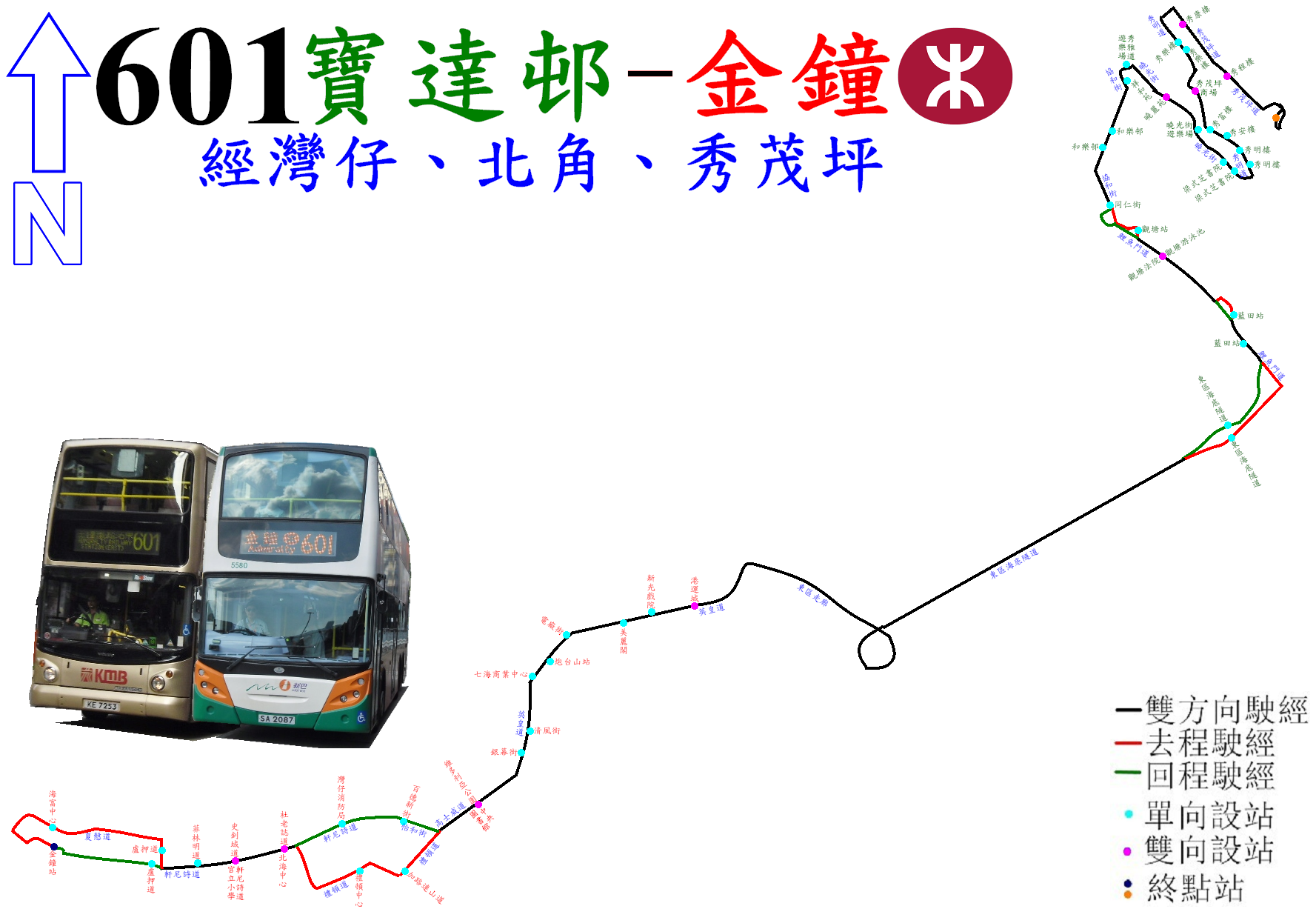 中文（香港）: 過海隧巴601線的走線圖